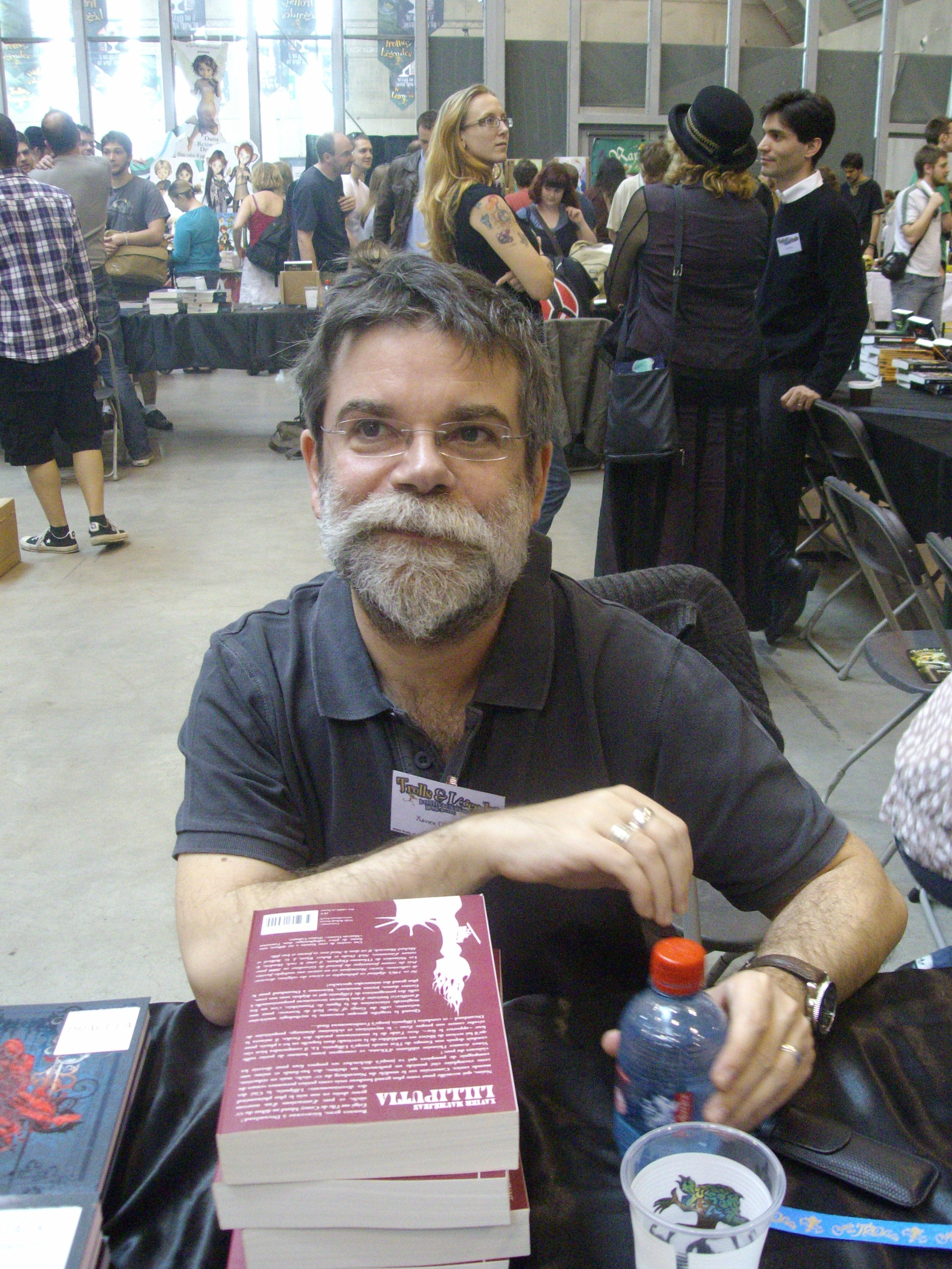 Xavier Mauméjean au festival Trolls et légendes de Mons